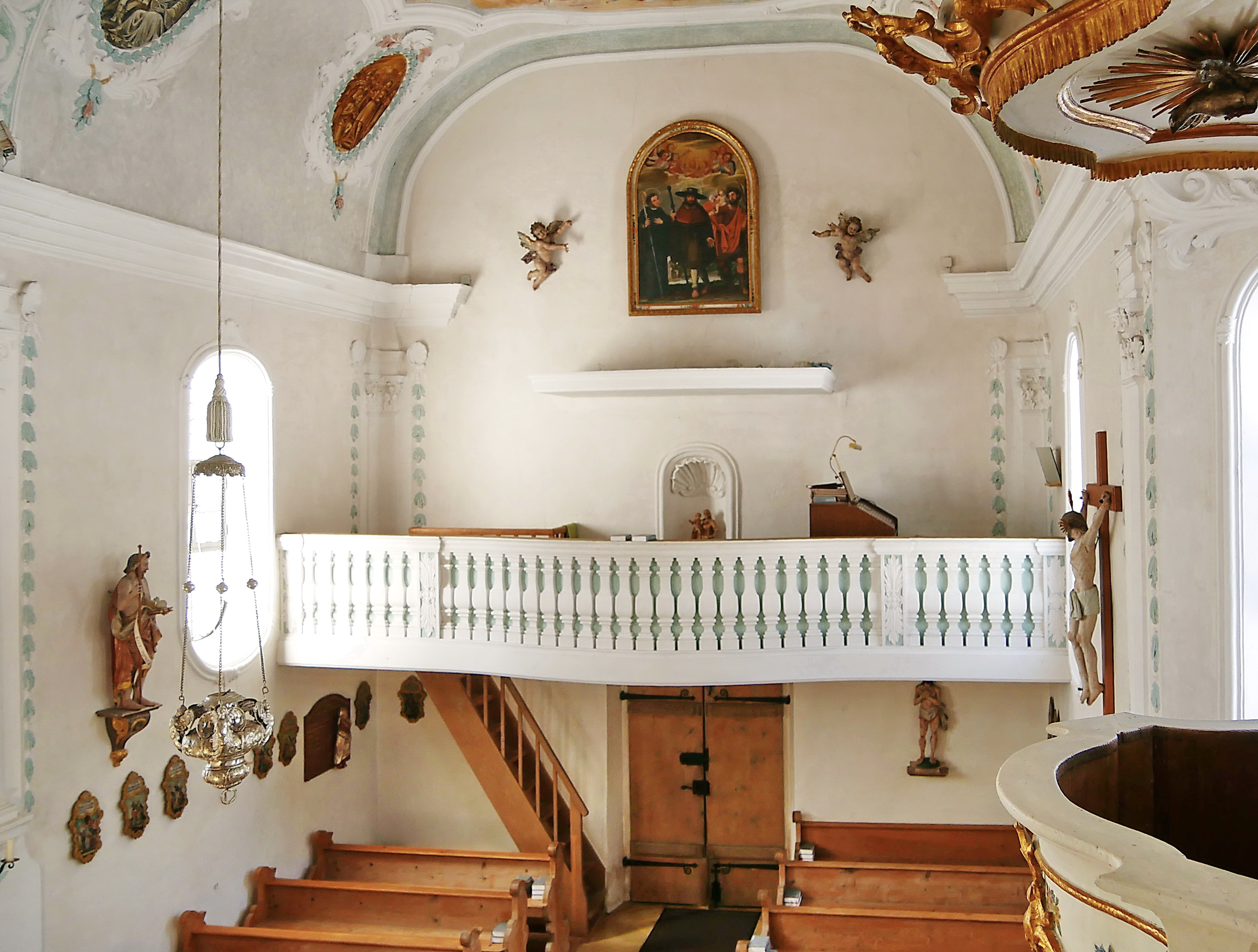 Alte katholische Pfarrkirche Sankt Jakobus in Walchensee. Detail: Empore. Das Wandbild an der Rückseite des Kirchenraumes zeigt gemeinsam St. Leonhard, St. Jakobus und St. Christophorus